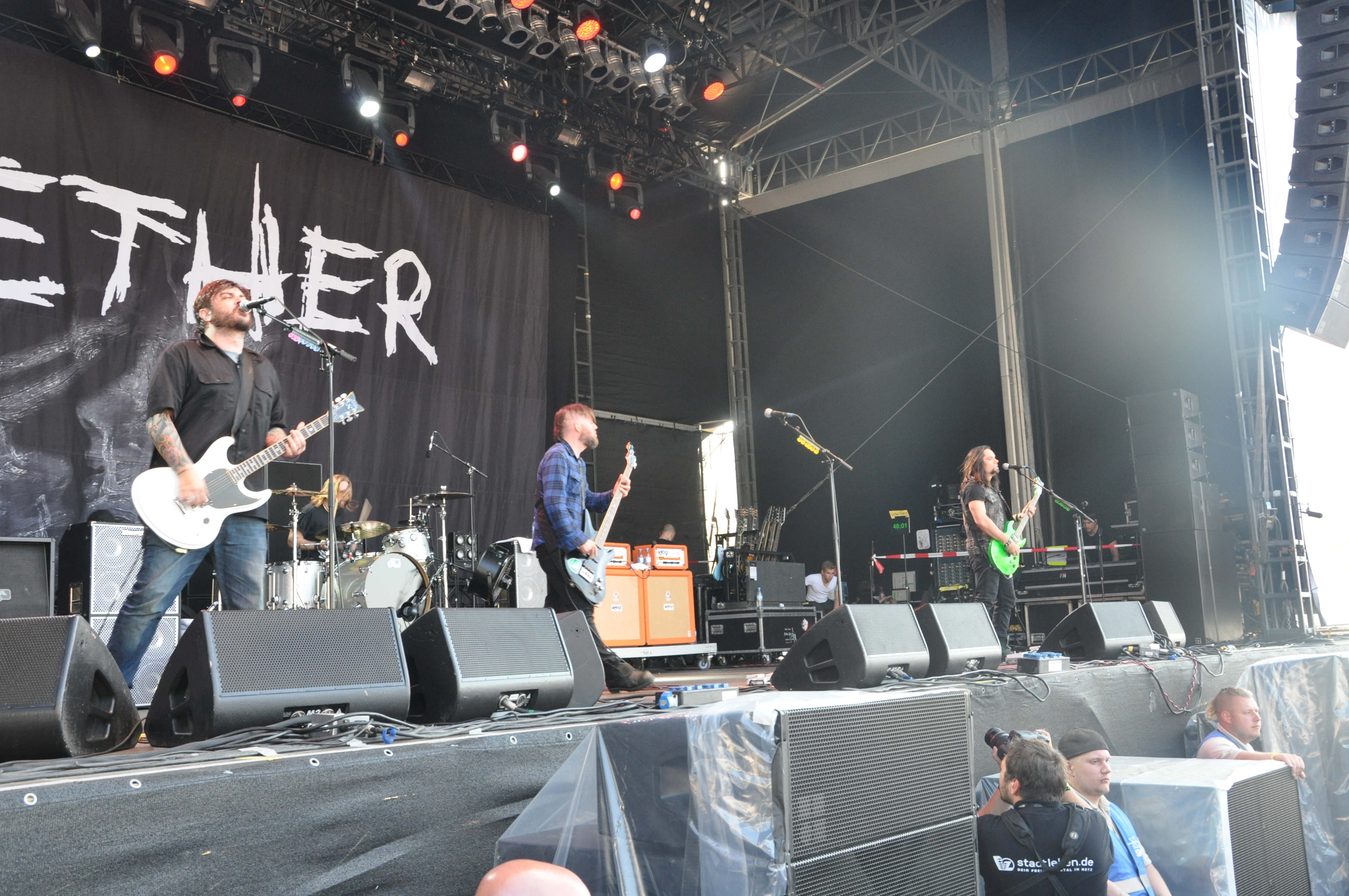 Seether auf der Clubstage bei Rock am Ring 2014